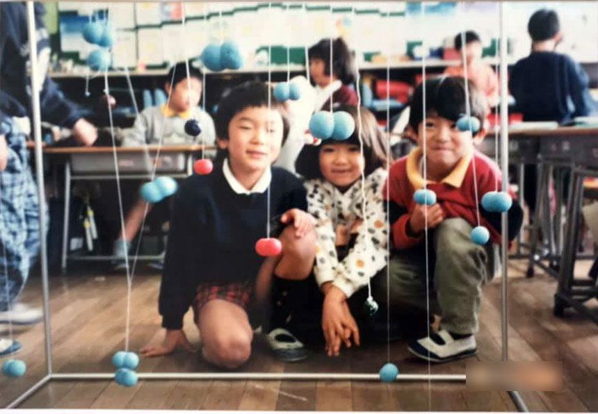 仮説実験授業の授業書〈もしも原子がみえたなら〉の授業で，空気の一億倍分子模型を見ている小学校1年生。1993年の授業。They are looking the models of molecules in the air.The suze of the aton and the molecule is magnified 100 million times.At he Hypothesis-Experiment Classbook’If you could see an atom ’.This is the class of elementary school in Japan in1993.